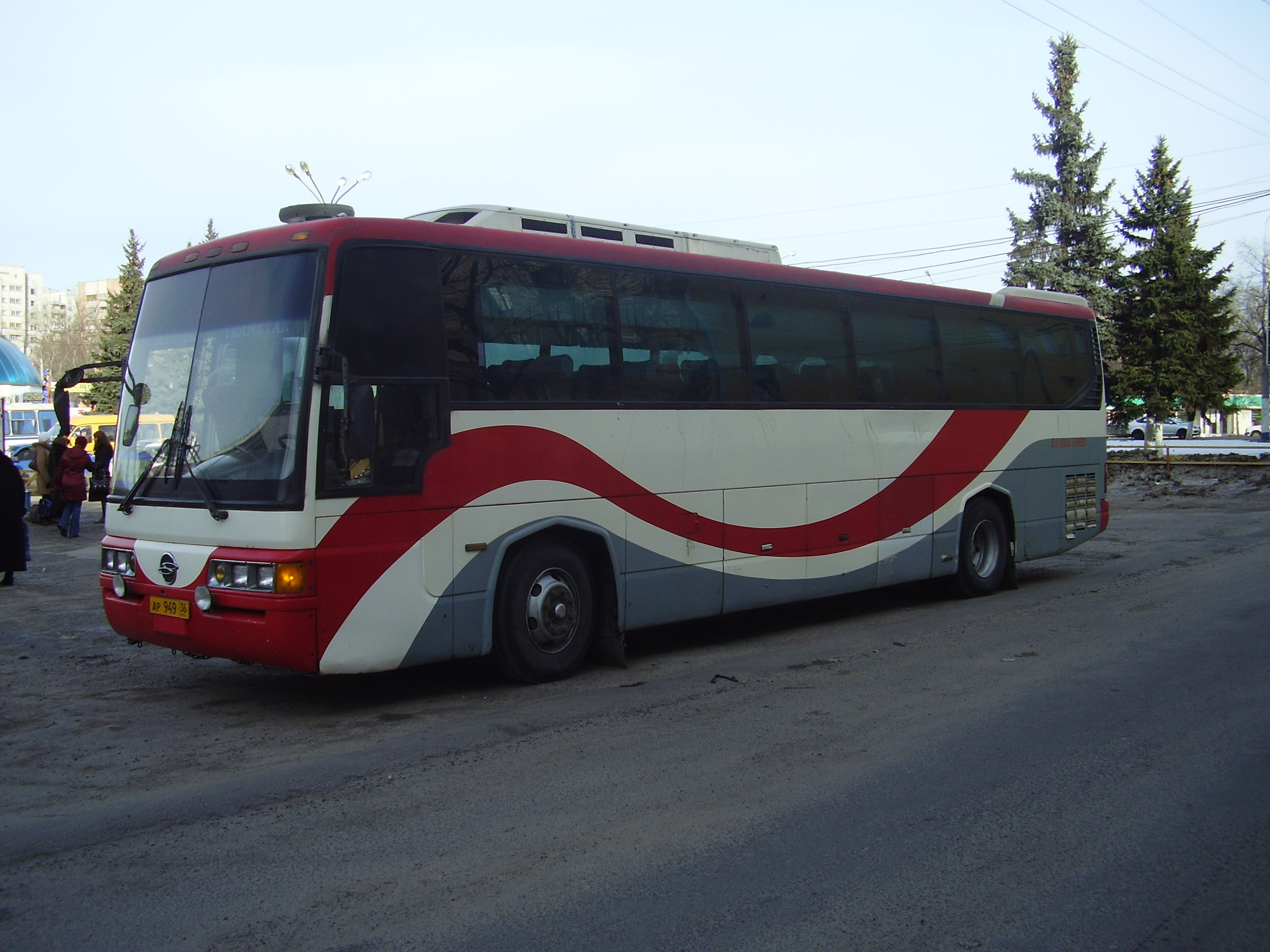 SsangYong Transstar в Воронеже